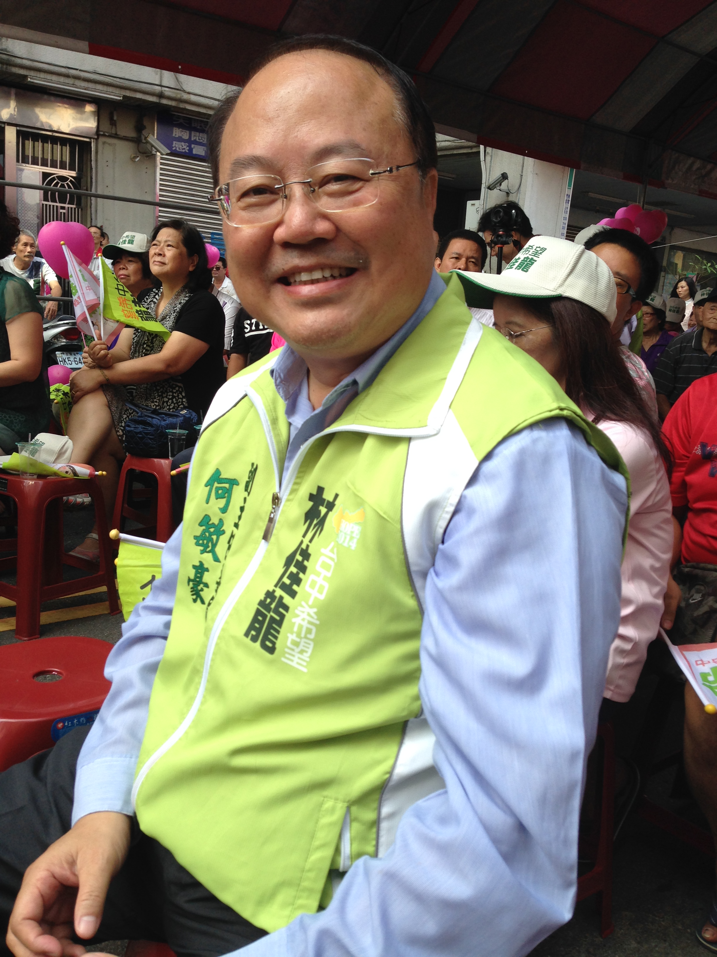 何敏豪